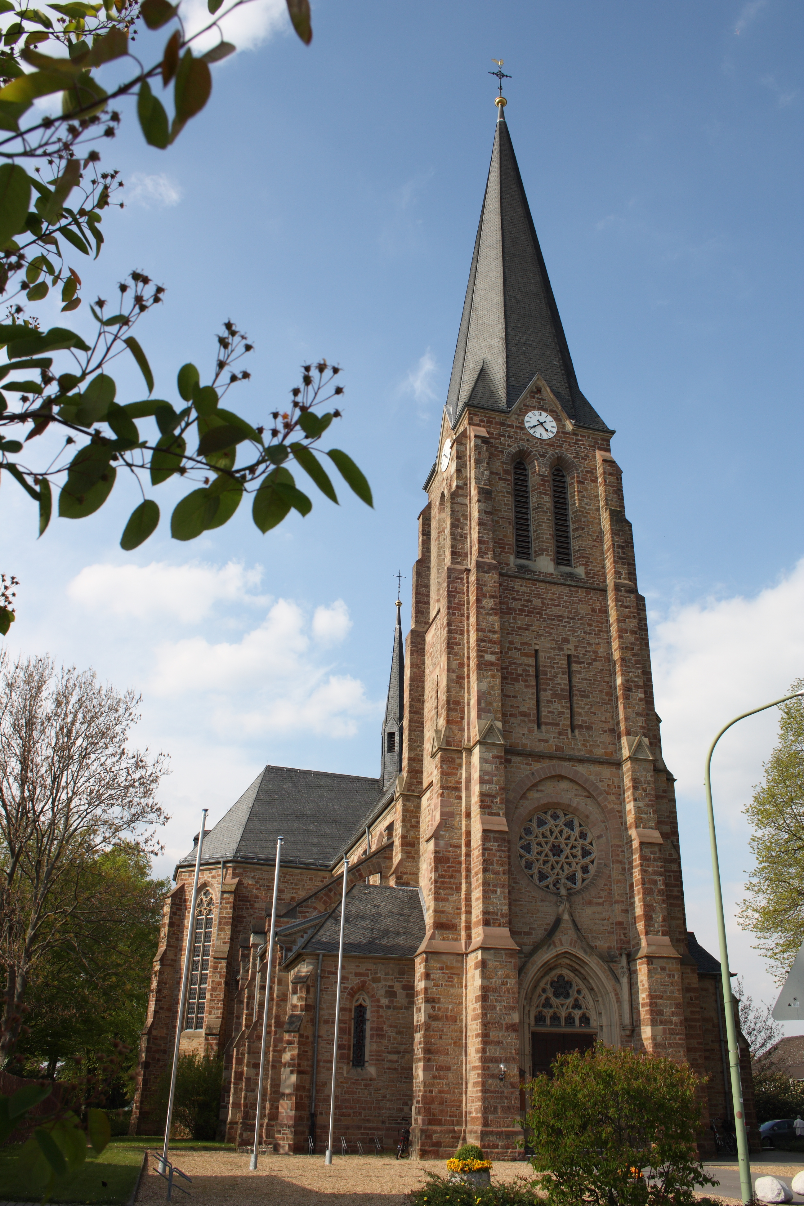 katholische Pfarrkirche St. Cyriakus in Niederau